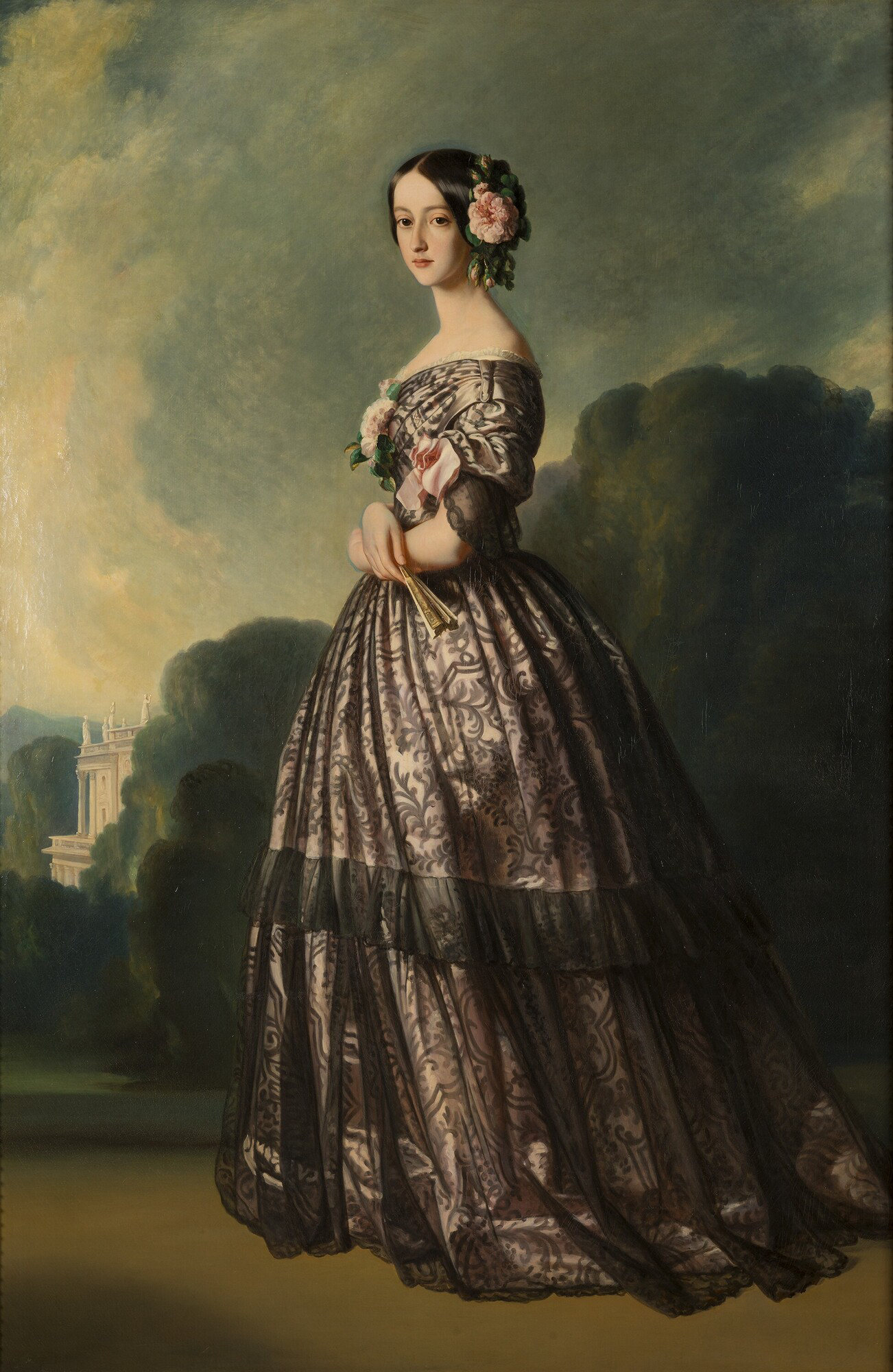 Françoise-Caroline de Bragance, princesse de Joinville